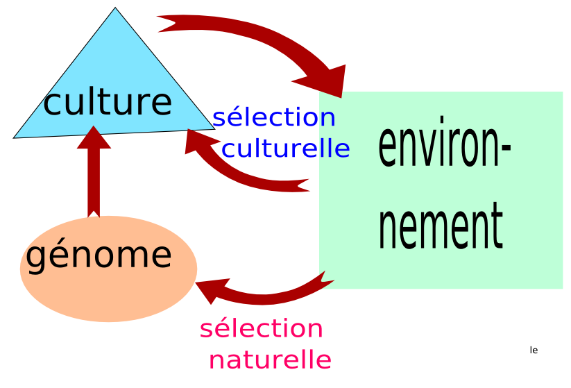 relation entre culture, génomes et environnemnt